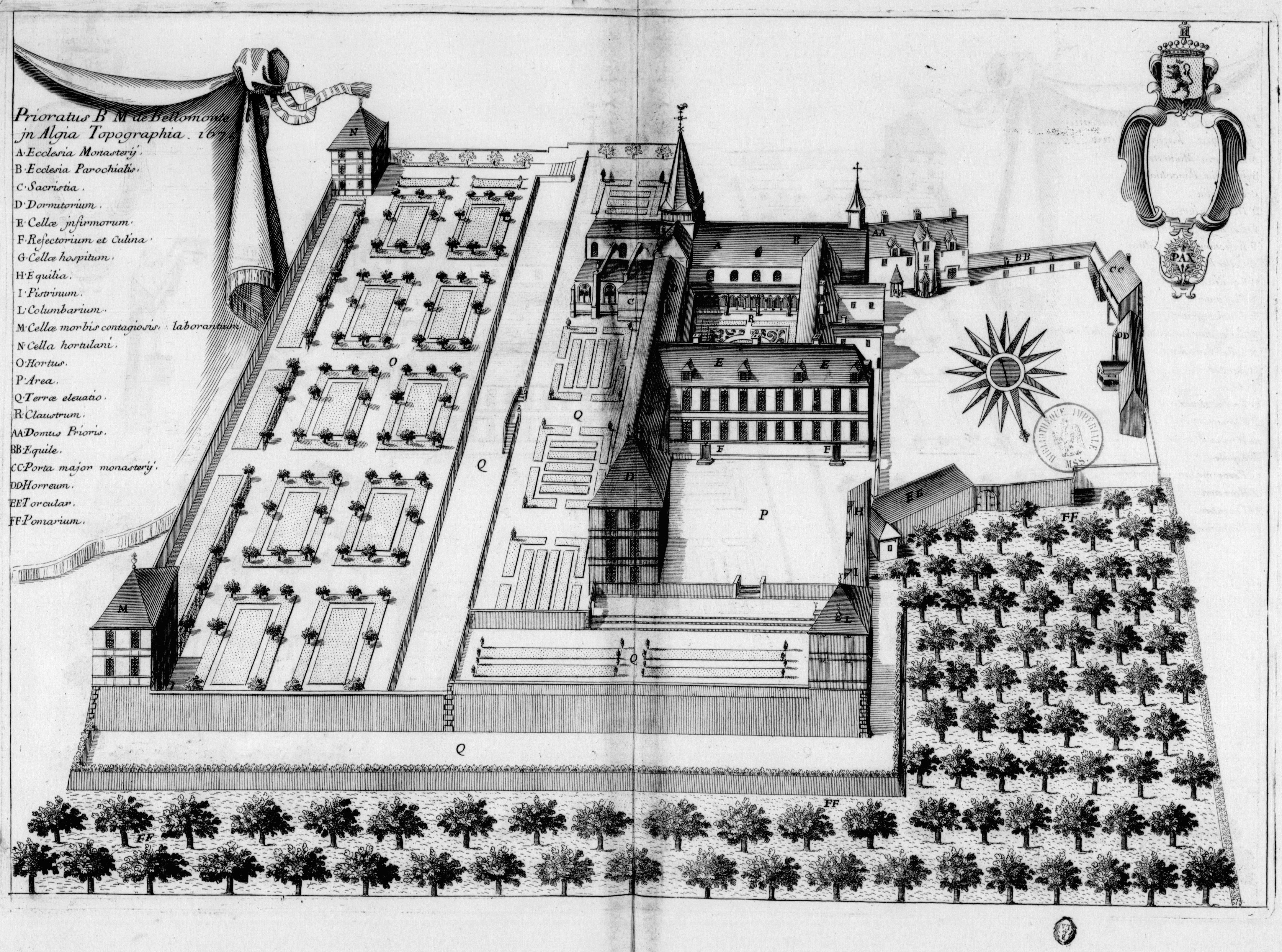 Planche gravée du 17ème siècle représentant le prieuré de Beaumont-en-Auge, dans le livre Monasticon Gallicanum.